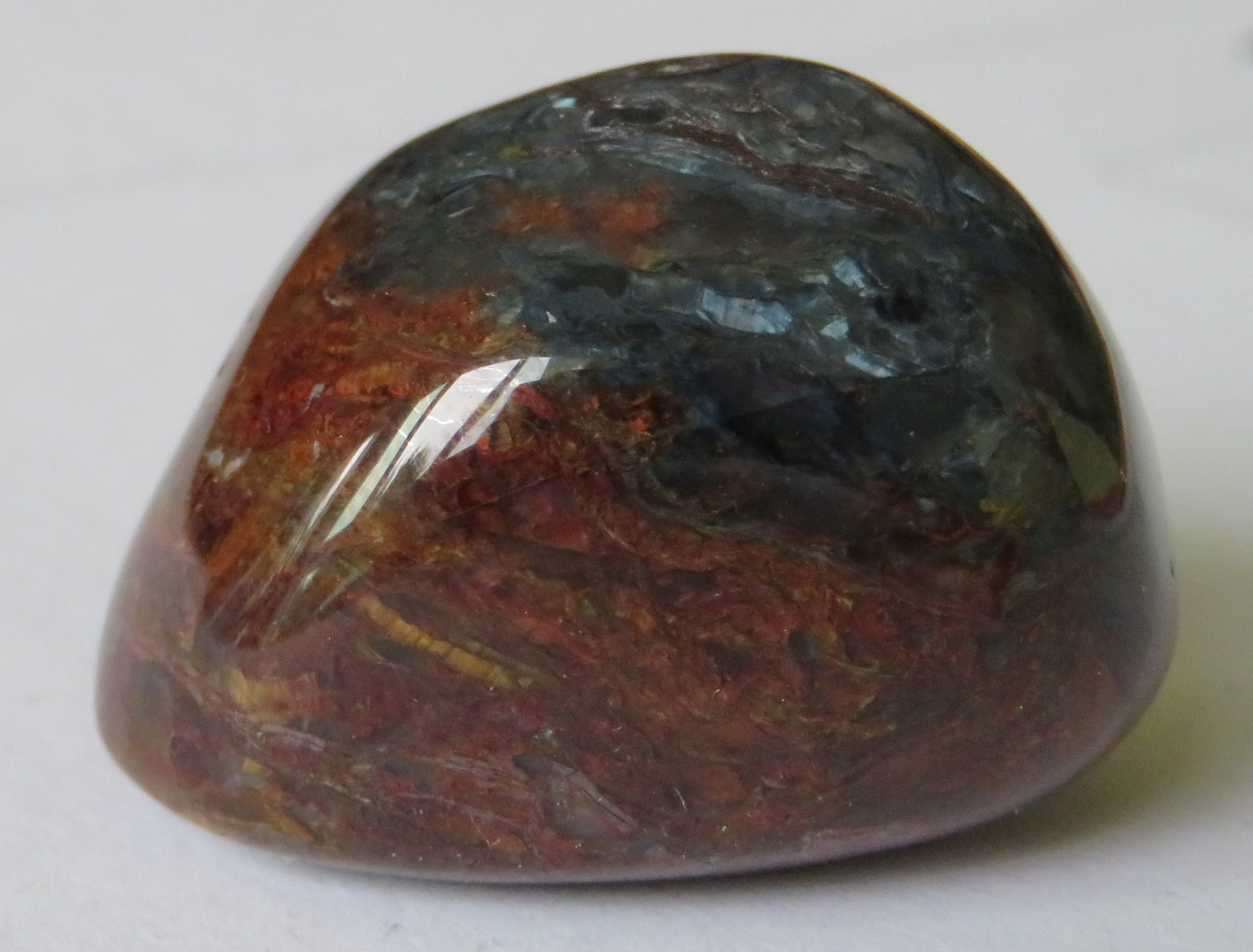 Gestein (Schmuckstein) Pietersit, geschliffen, Handschmeichler.